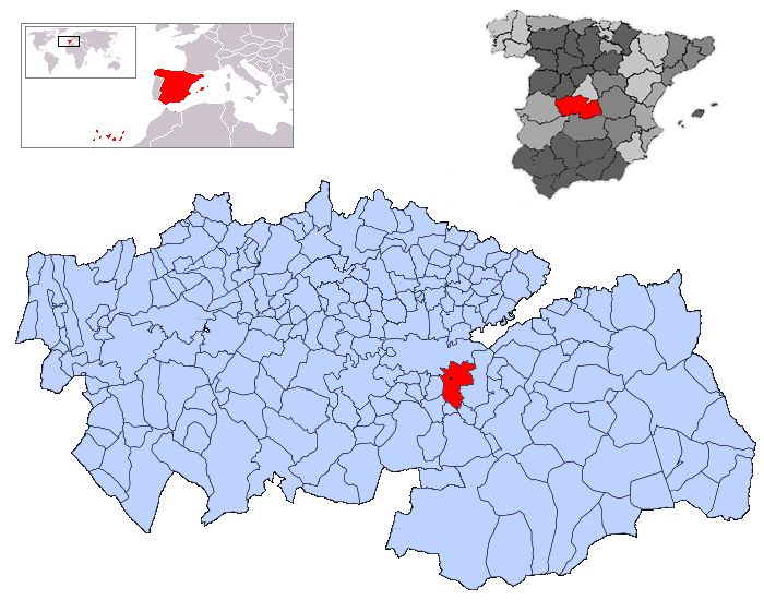 Maqueda en la provincia de Toledo